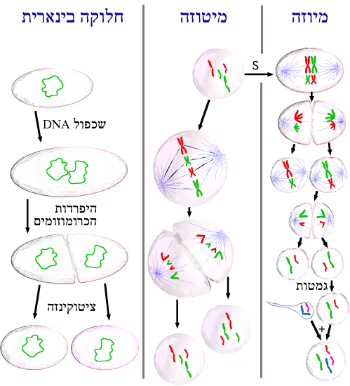 שלושת סוגי הרבייה התאית. תרגום לעברית של תרשים מוויקישיתוף. רישיון קטגוריה:תמונות להעברה לוויקישיתוף